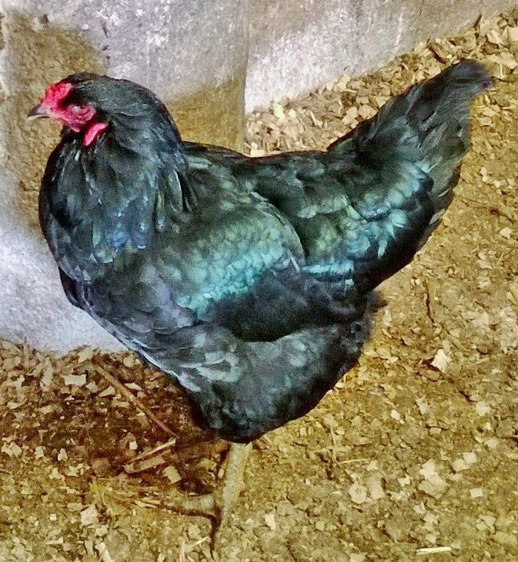 atak tavuğu